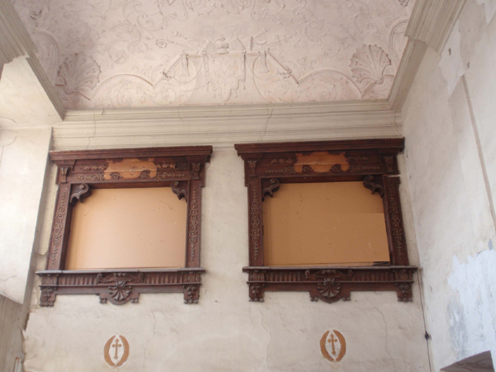 Ehemalige Grafenloge in der ehemaligen Schlosskapelle von Schmida